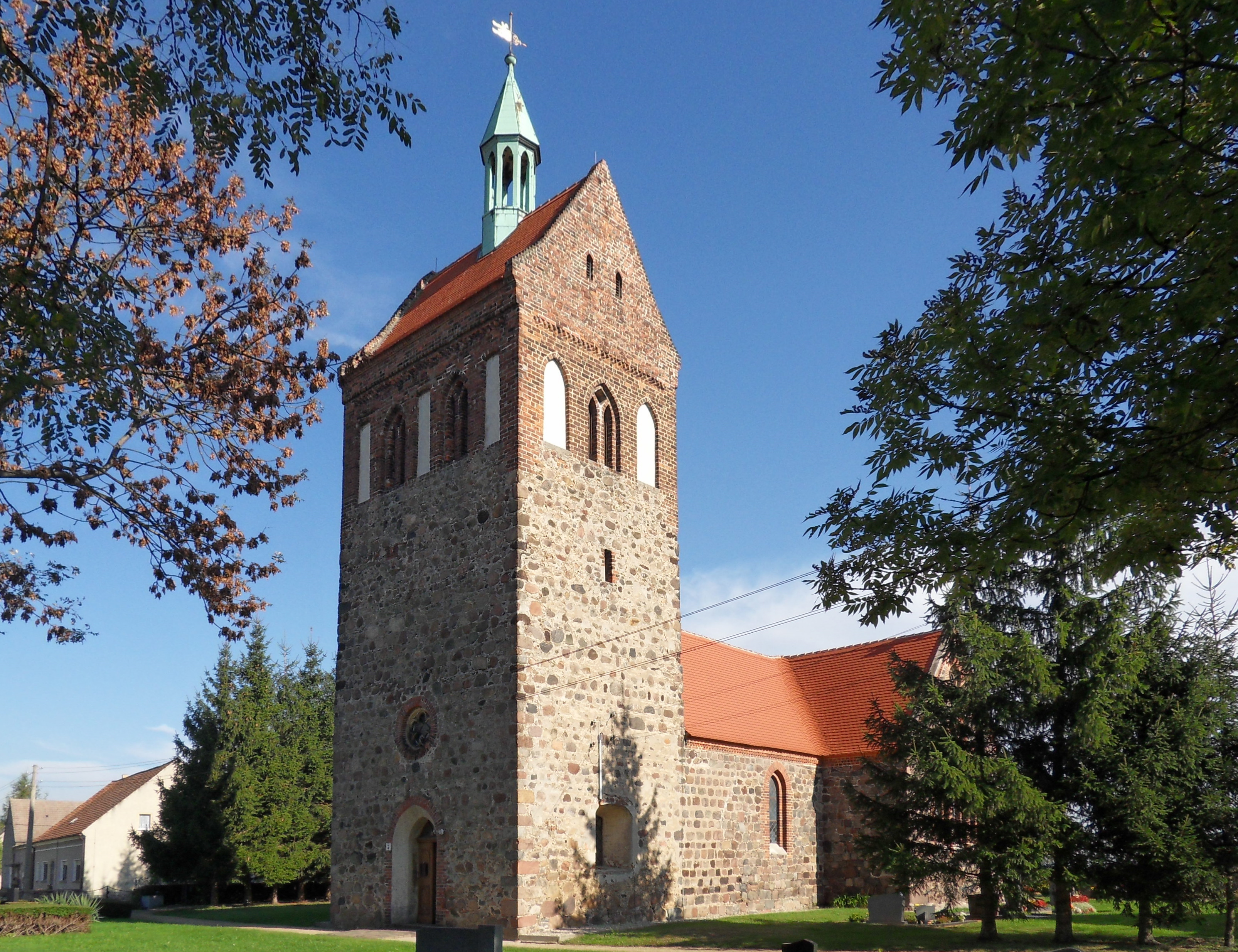 Kirche in Arenzhain, Baudenkmal